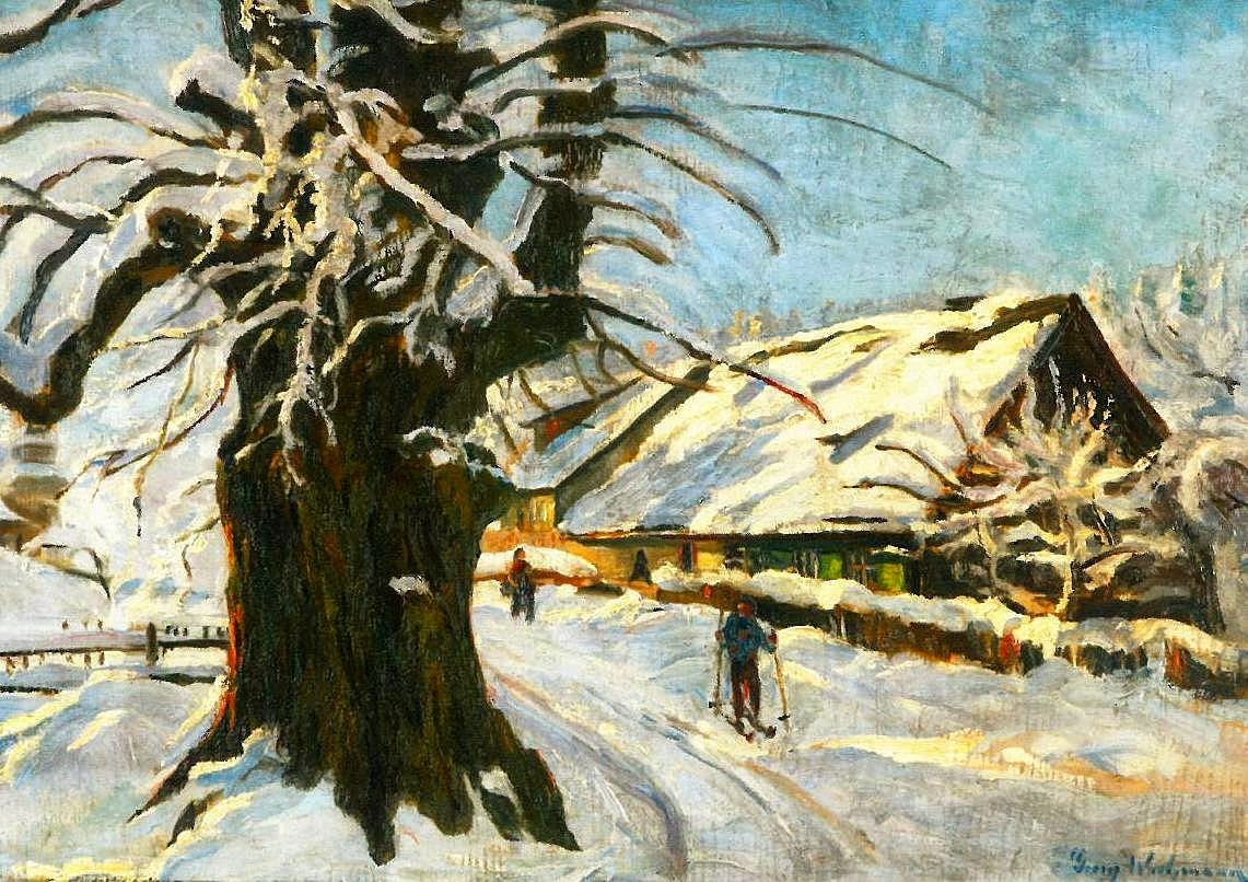 Winterliche Dorfstraße im Riesengebirge